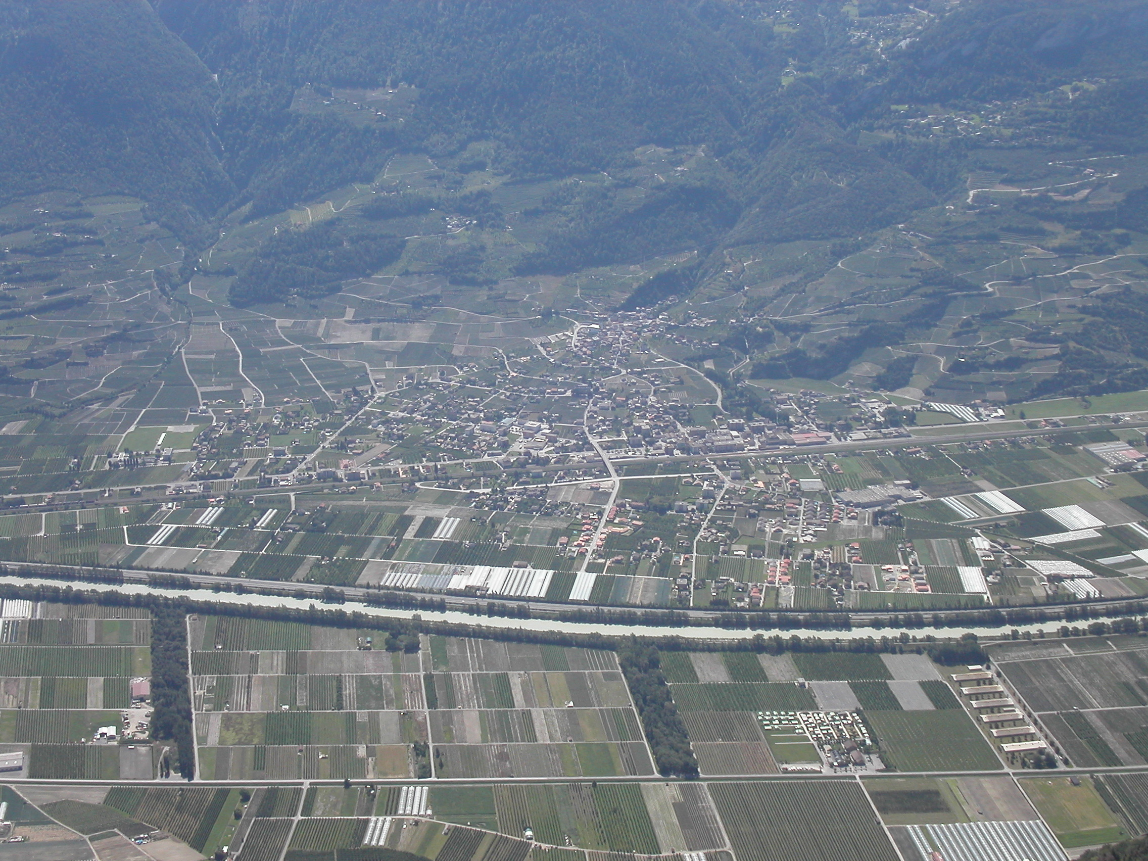 Vue de Saxon, depuis les hauteurs d'Ovronnaz